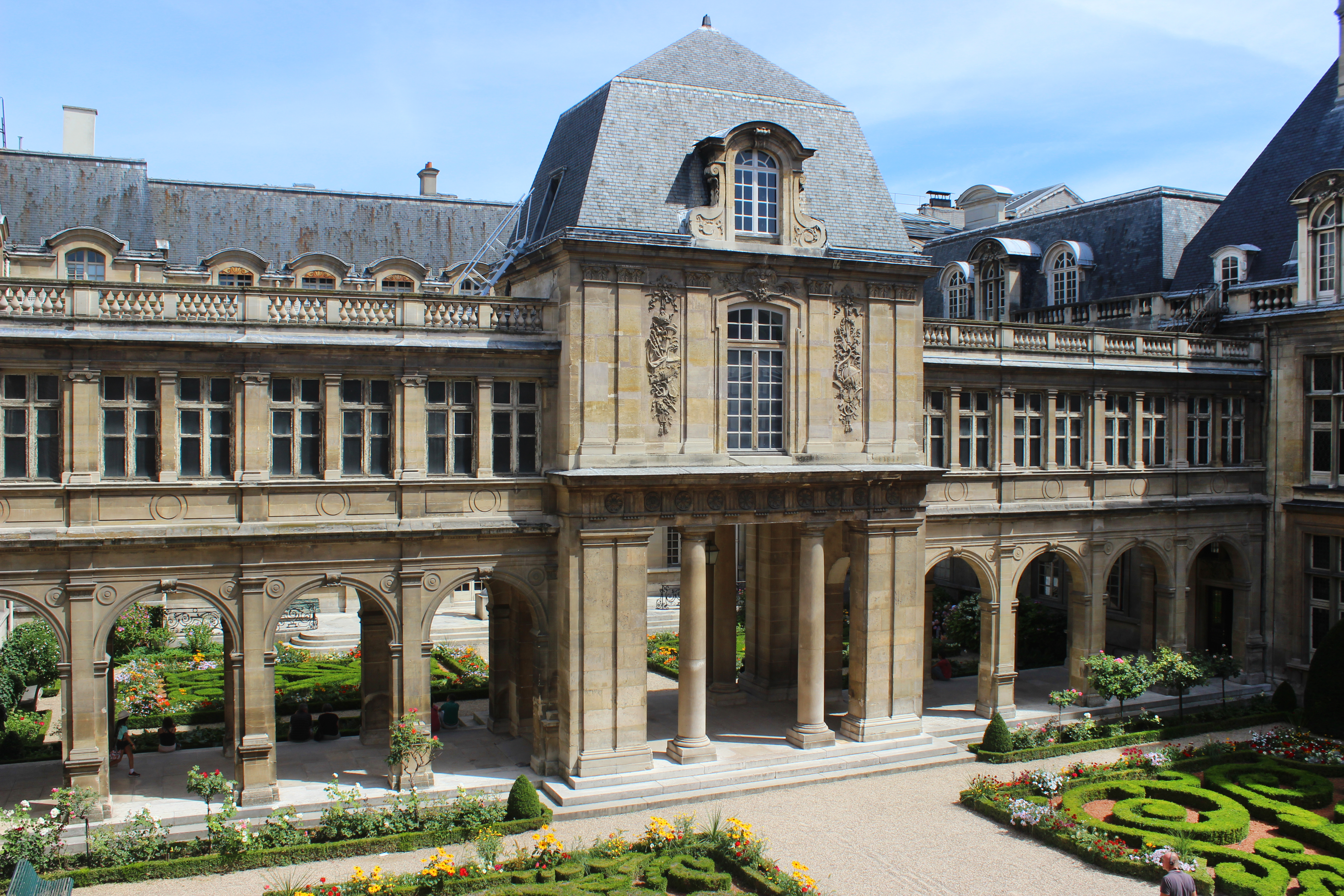 París. Musée Carnavalet, patio.